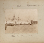 Lille : Champ de Mars : Exposition internationale : Pavillon des Beaux-Arts Date : 1902 [1902] Dimensions : 8,1 x 11 cm. Technique : Photographie